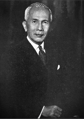 แปลก พิบูลสงคราม ในหนังสือธรรมศาสตร์